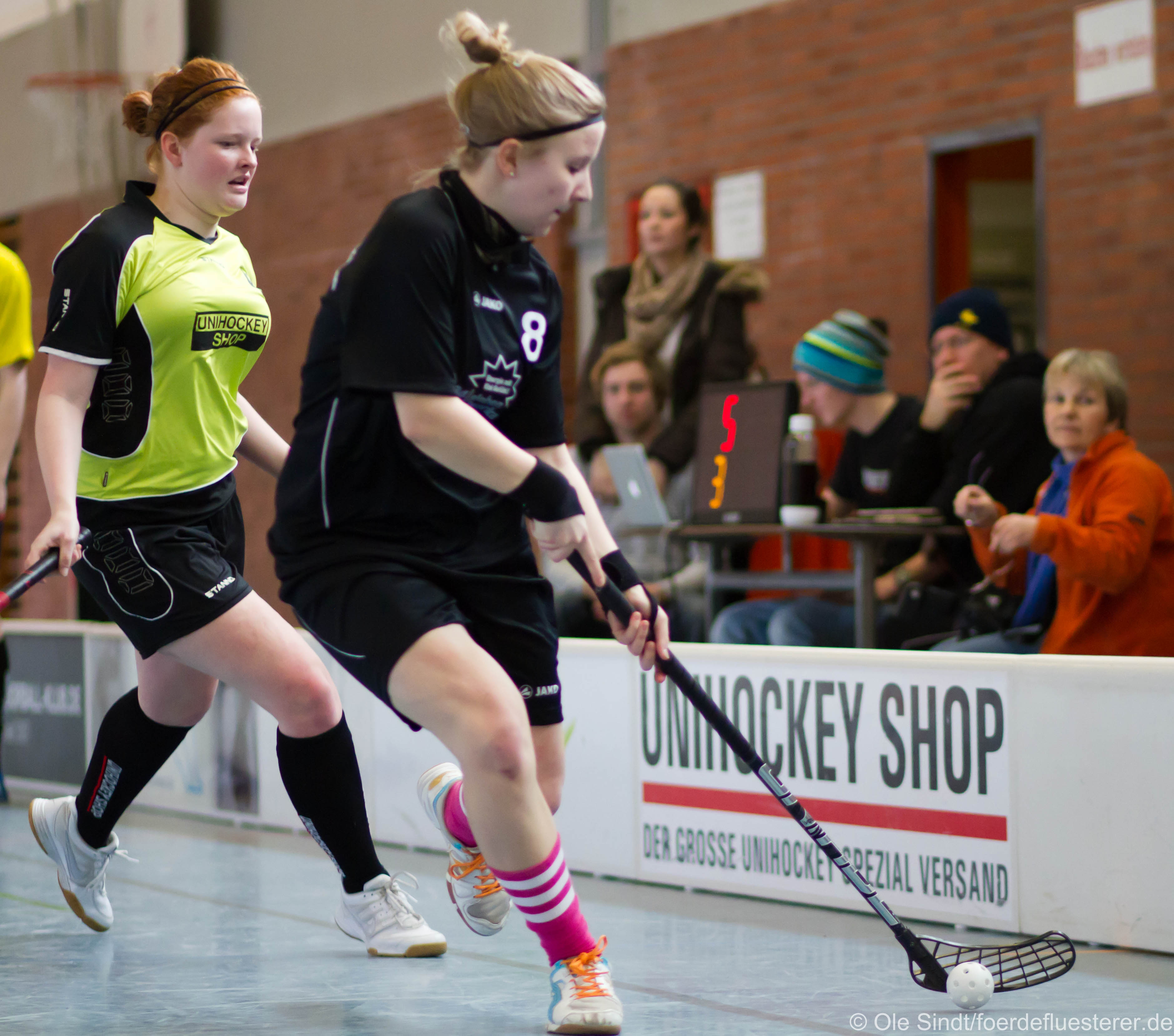 Women floorball